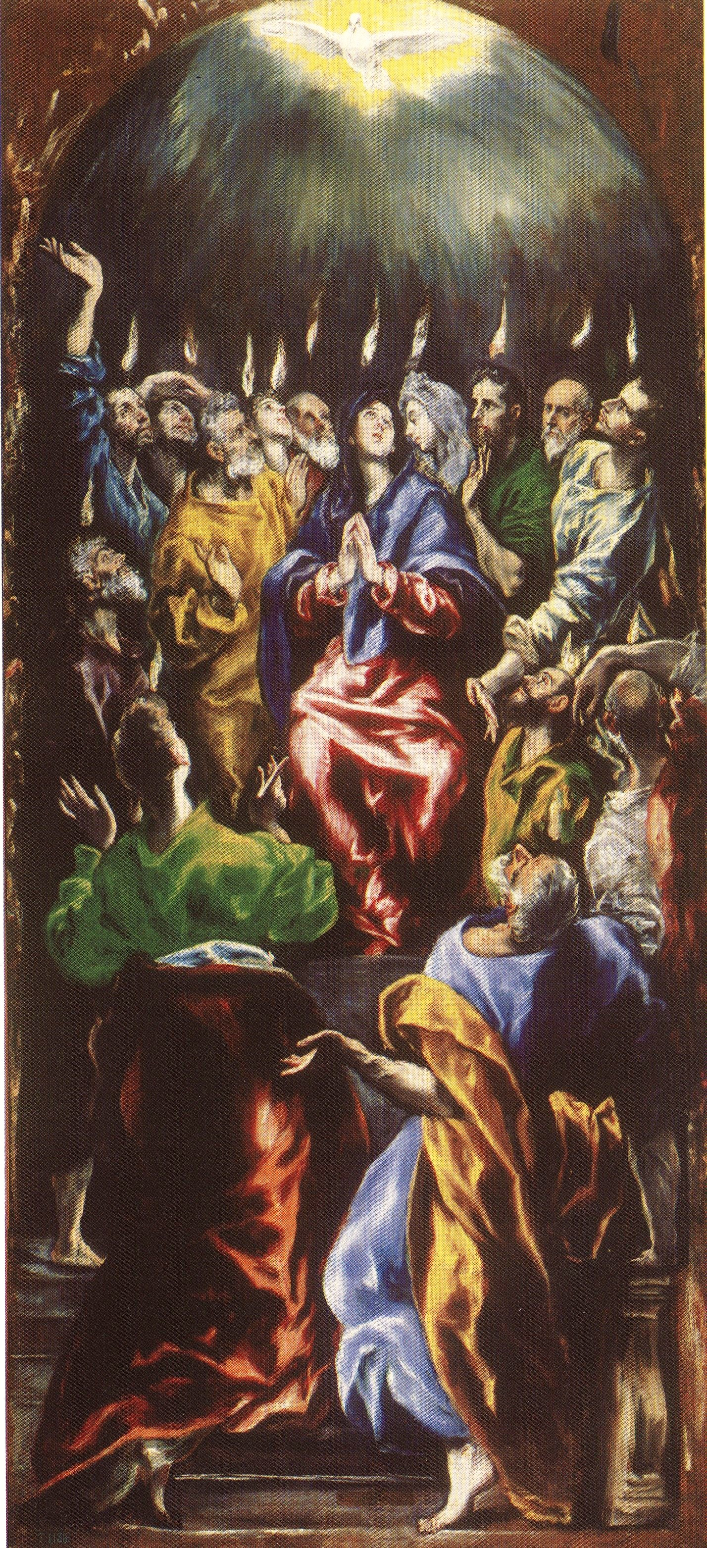 La obra representa al Espíritu Santo descendiendo en forma de lenguas de fuego sobre los apóstoles de Jesucristo.